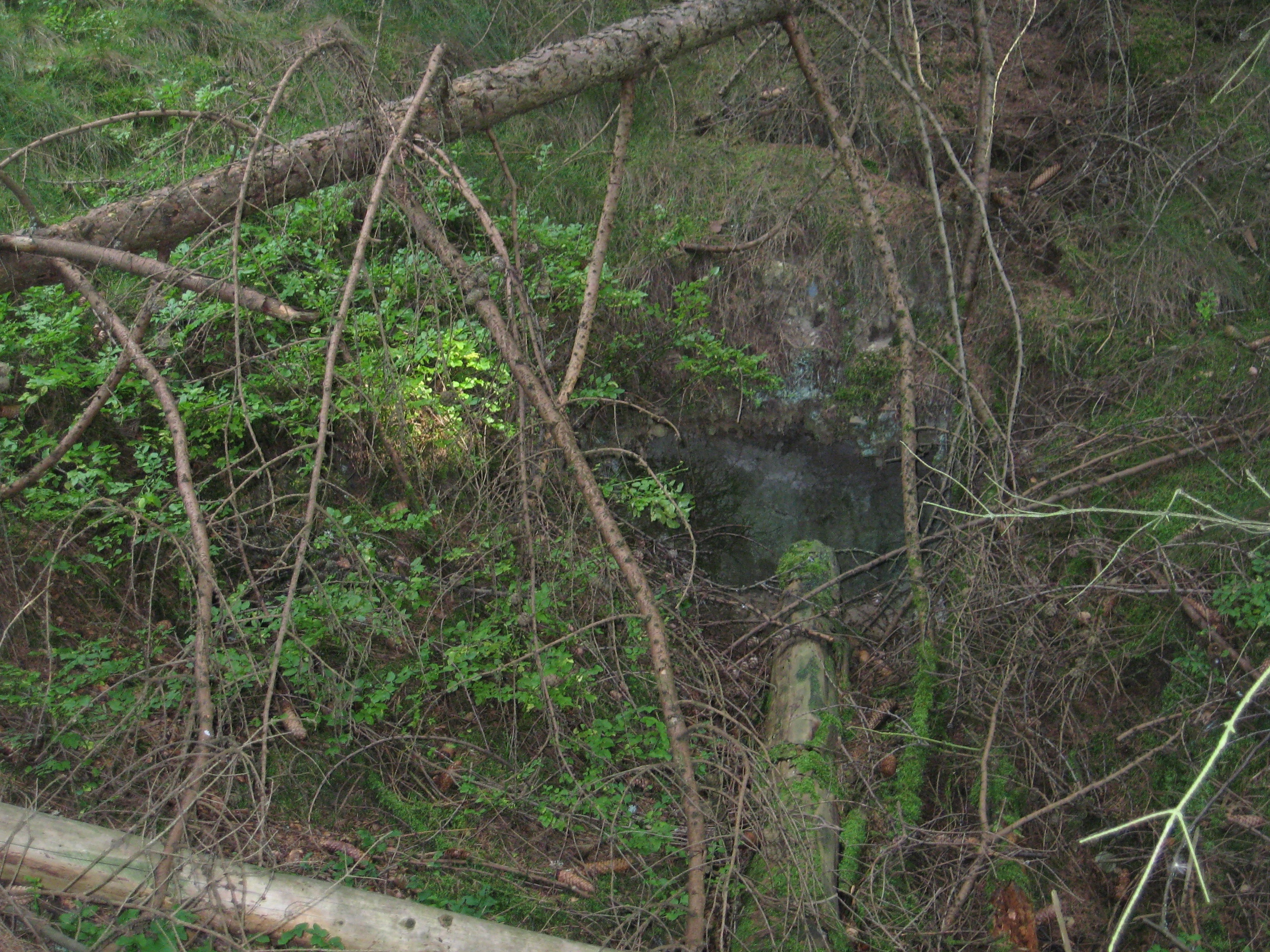 Stollenmundloch „Gleiskaute“ der Grube Junger Löwe, Salchendorf (Neunkirchen) / Siegerland.